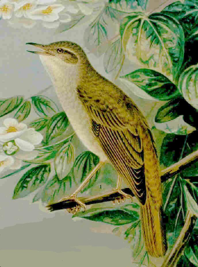 Nachtigall (Luscinia megarhynchos)